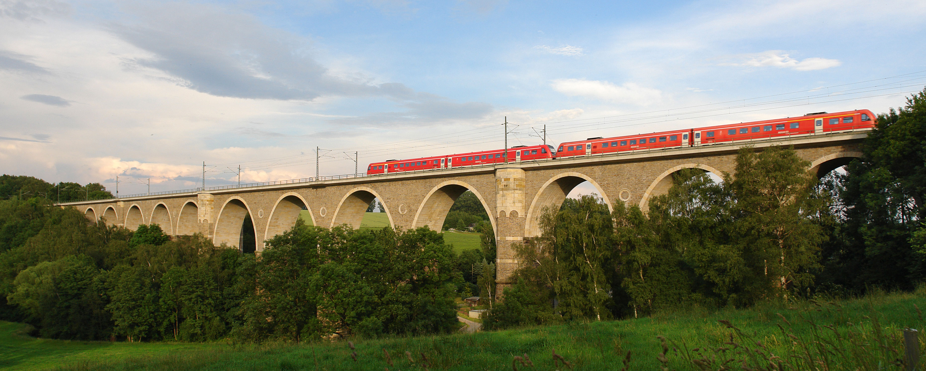 Viadukt der Sachsen-Franken-Magistrale, Gemeinde Oberschöna